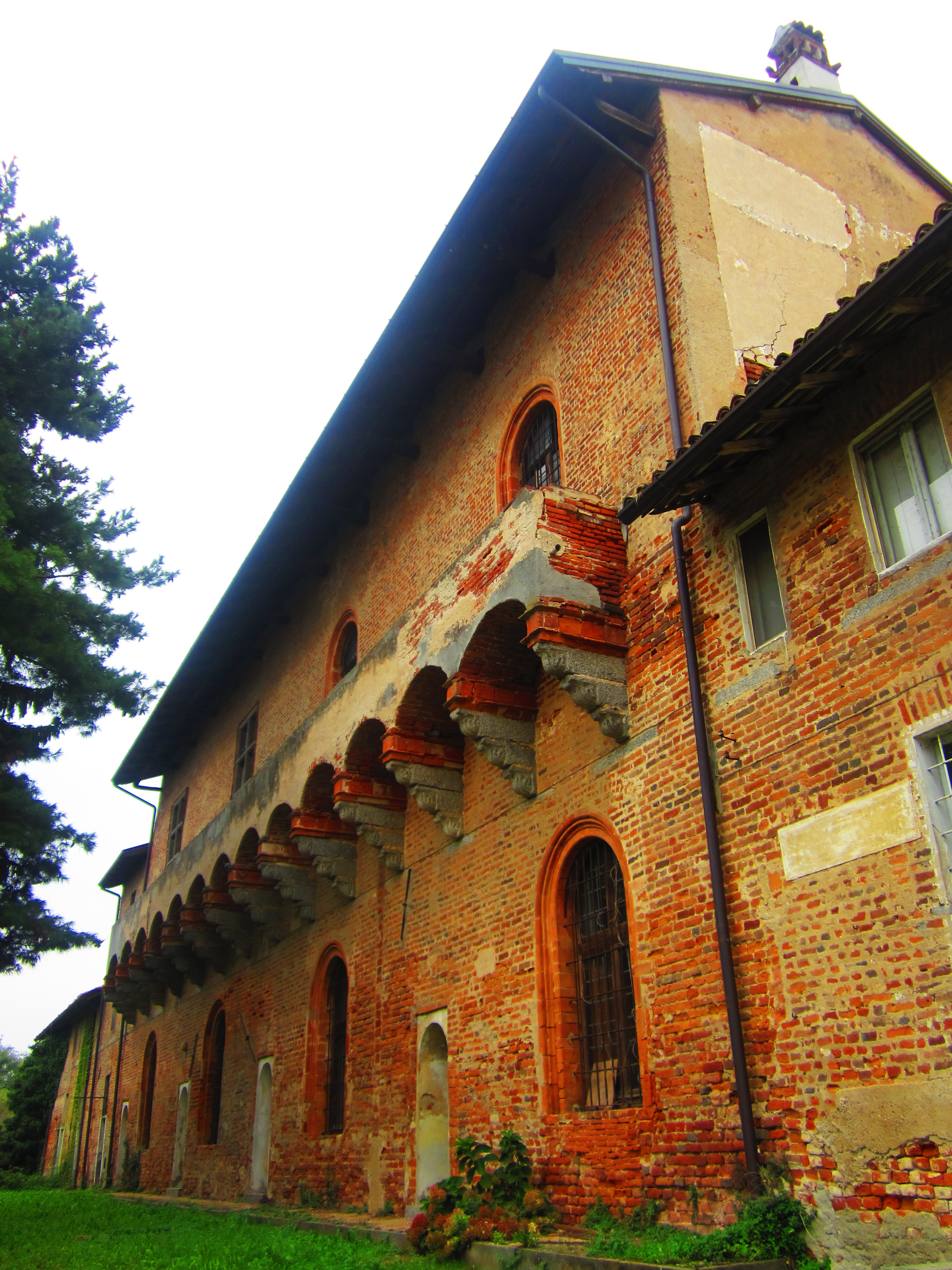 Castello di Mirabello This is a photo of a monument which is part of cultural heritage of Italy.